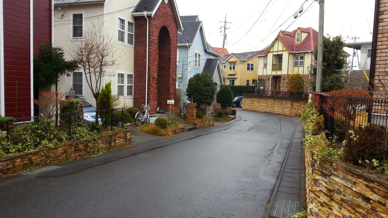 永国の住宅街